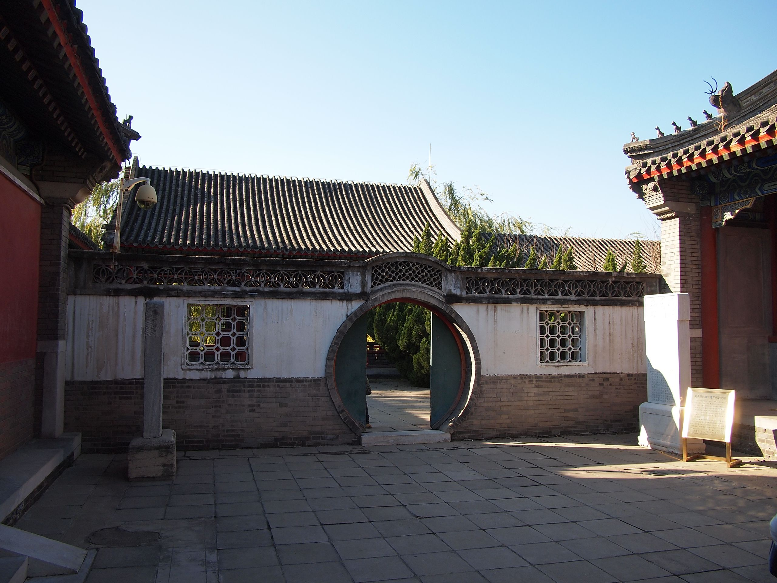 慈悲庵 - Mercy Nunnery - 2011.11